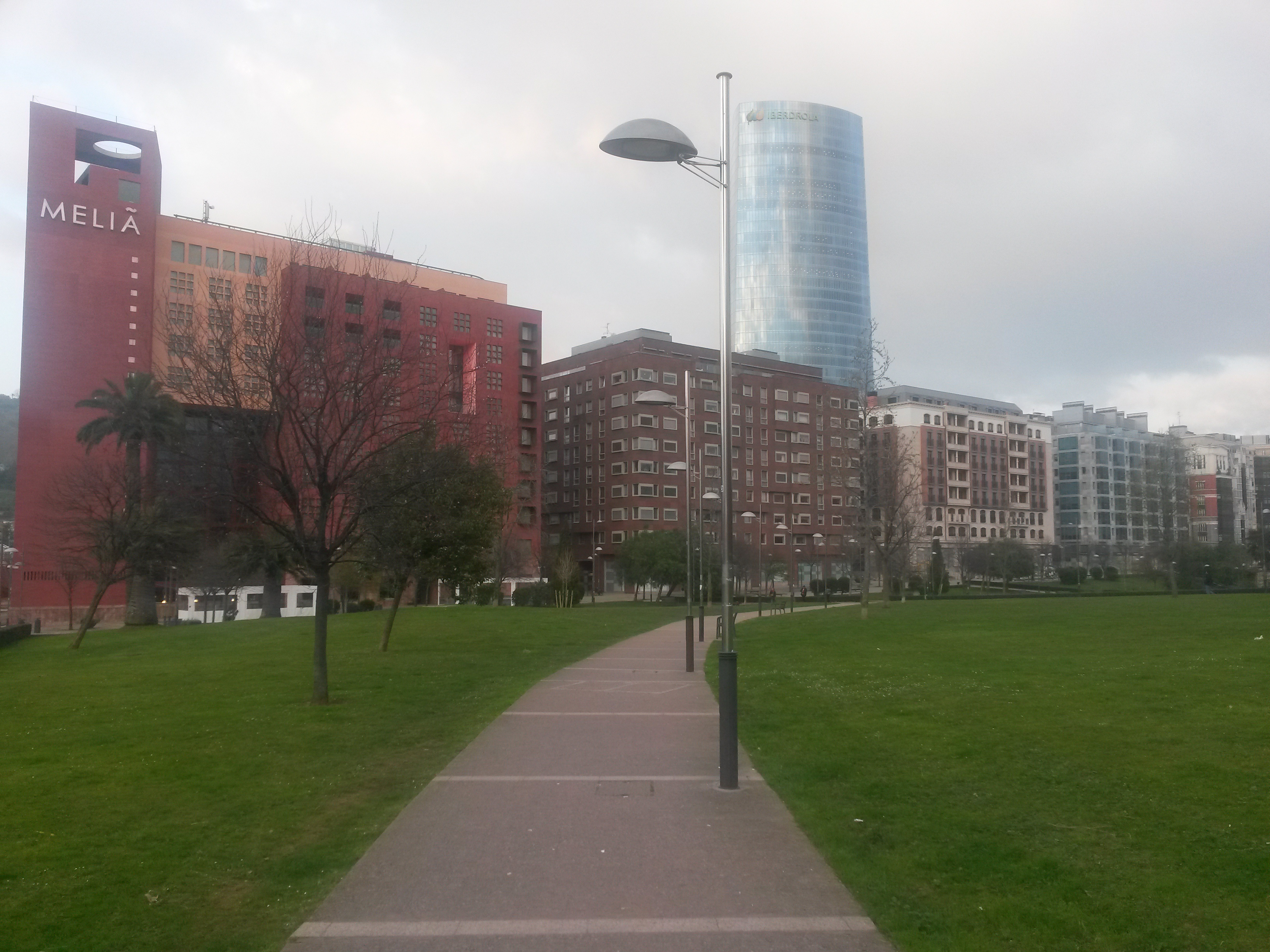 Panorámica del Paseo Eduardo Victoria de Lecea desde el Parque Casilda Iturrizar.